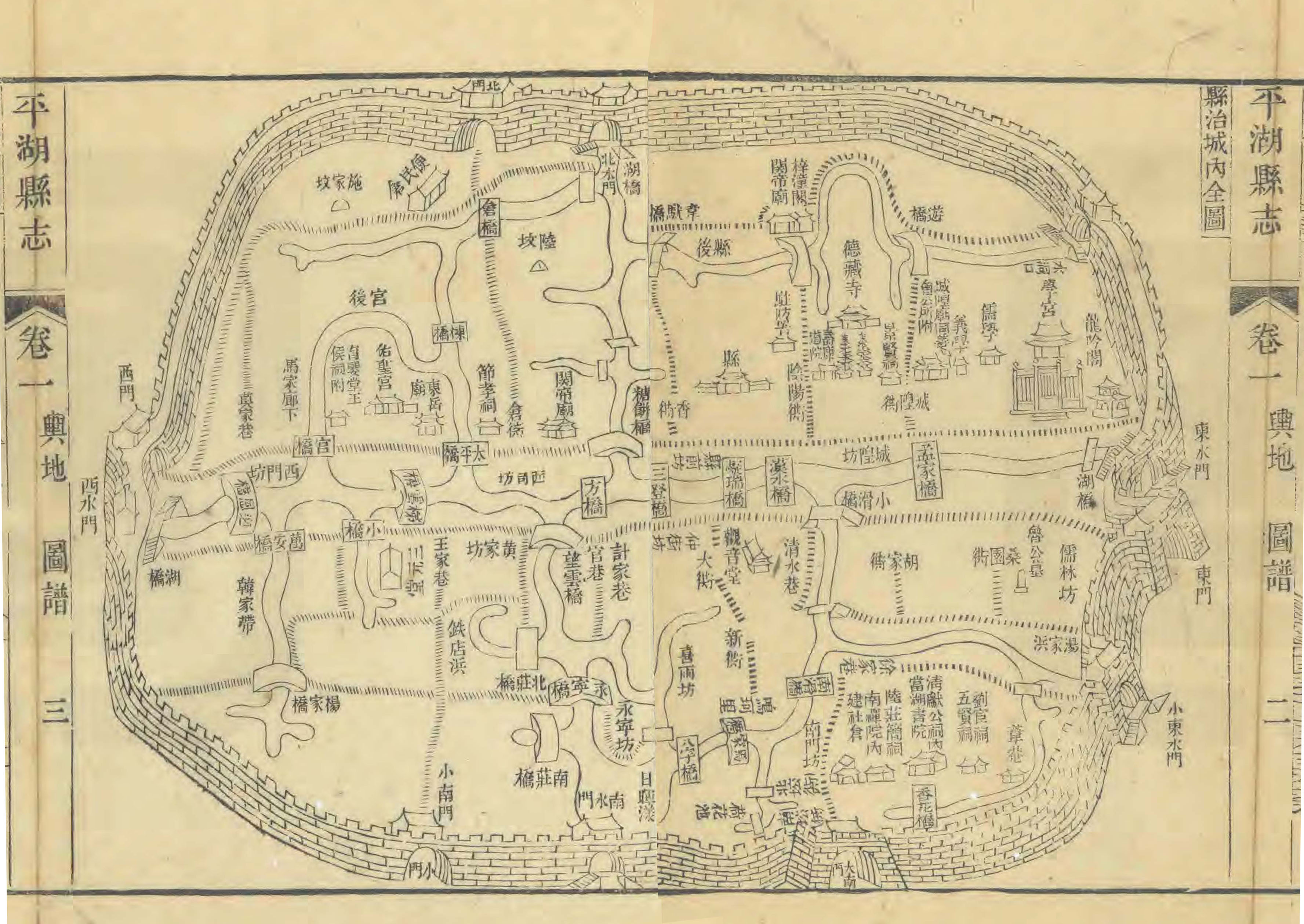 乾隆四十五年（1780）《平湖县志》县城图。